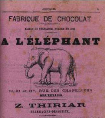 Publicité pour le chocolat Z. THIRIAR (Pharmacien droguiste) de Bruxelles, rue des Chapeliers. Extrait de l'Almanach Commercial de Bruxelles, édition 1875. Rapprochement surprenant avec le logo de la firme "Côte d'Or"